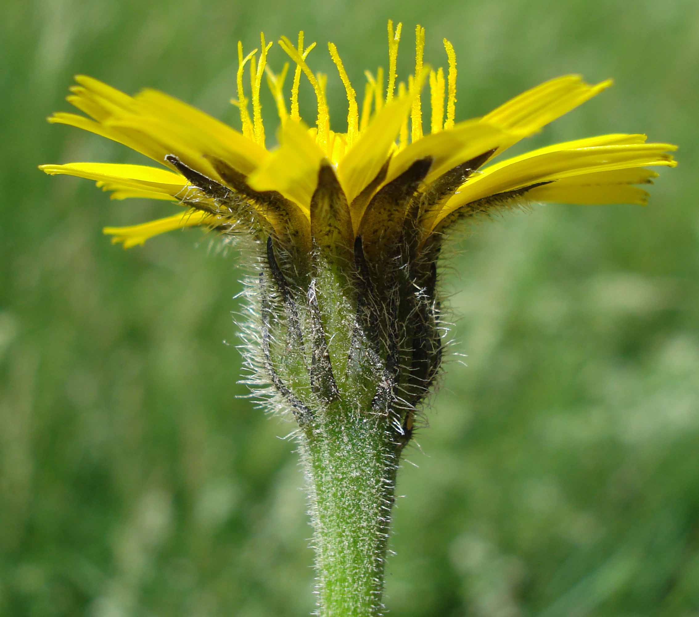 Leontodon hispidus (Unterfranken, Germany)